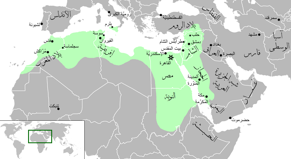 خارطة تُظهرُ الدَّولة الفاطميَّة في أقصى اتساعٍ لها.